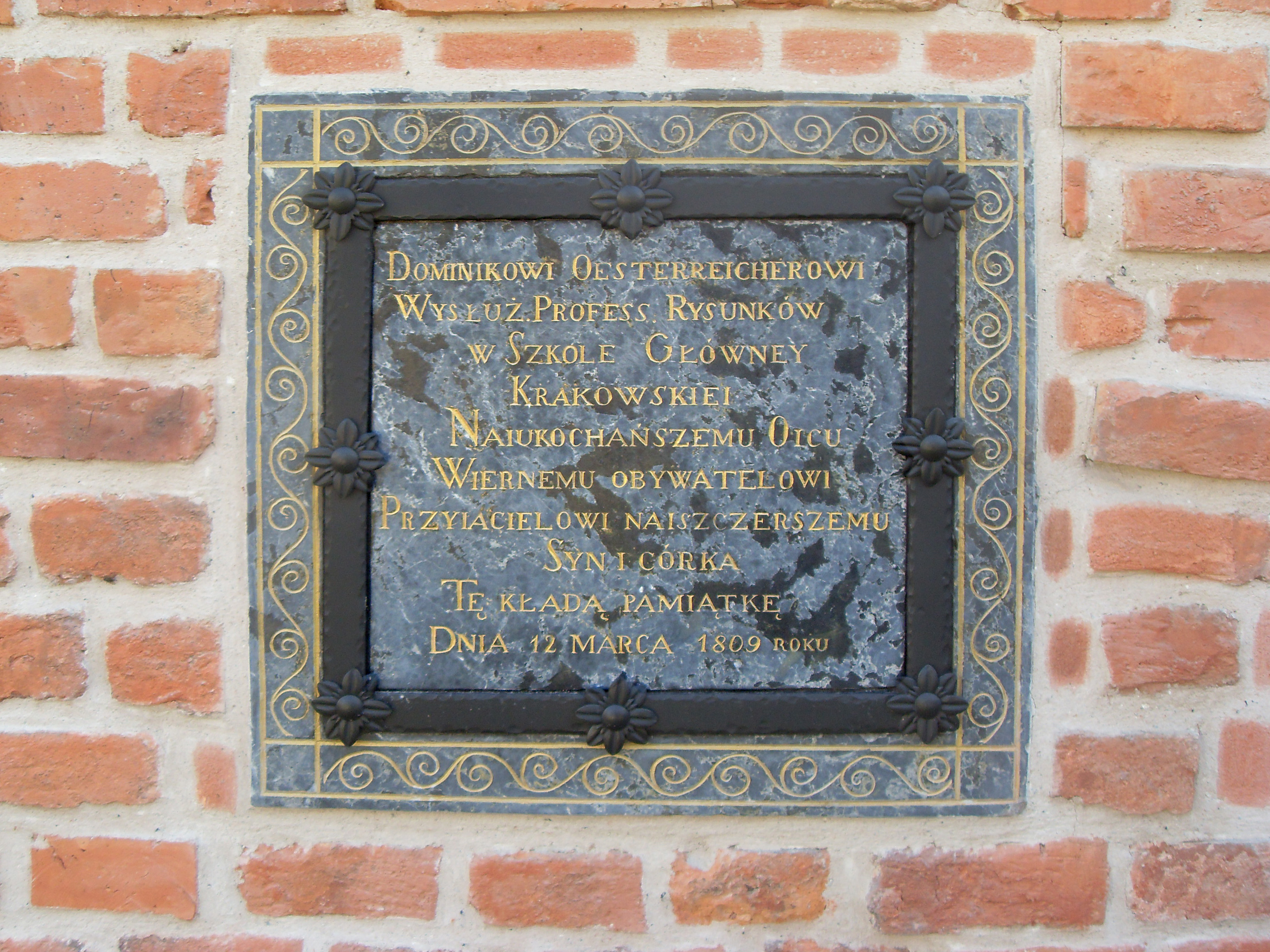 Epitafium Dominika Oesterreichera - protoplasty krakowskiej rodziny Estreicherów. Znajduje ono się na murze w najstarszej części Cmentarza Rakowickiego w Krakowie.